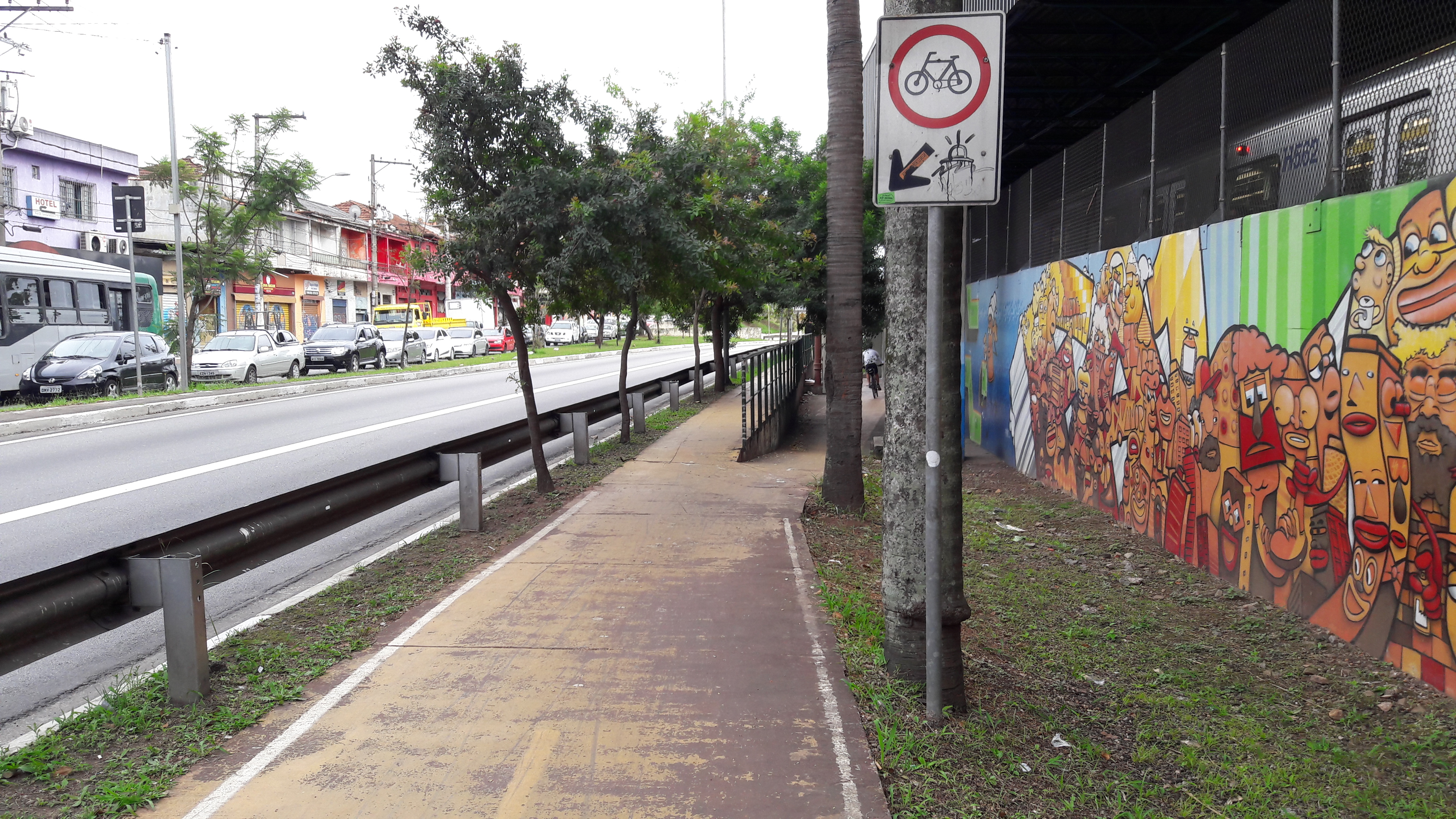 Ciclovia localizada na Radial Leste, em São Paulo (city), Brasil.